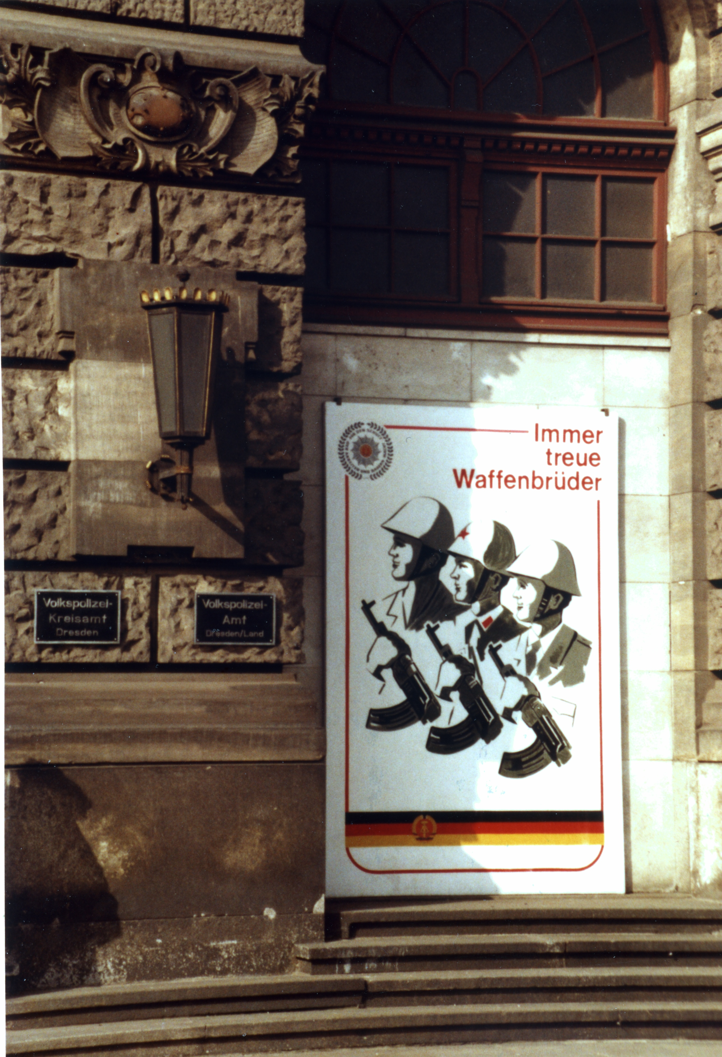 Propaganda-Plakat im Oktober 1985 in Dresden: „Immer treue Waffenbrüder“ am Dresdner Volkspolizei-Kreisamt (Polizeipräsidium)